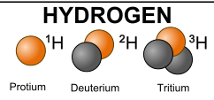 Isotopen des Wasserstoffs